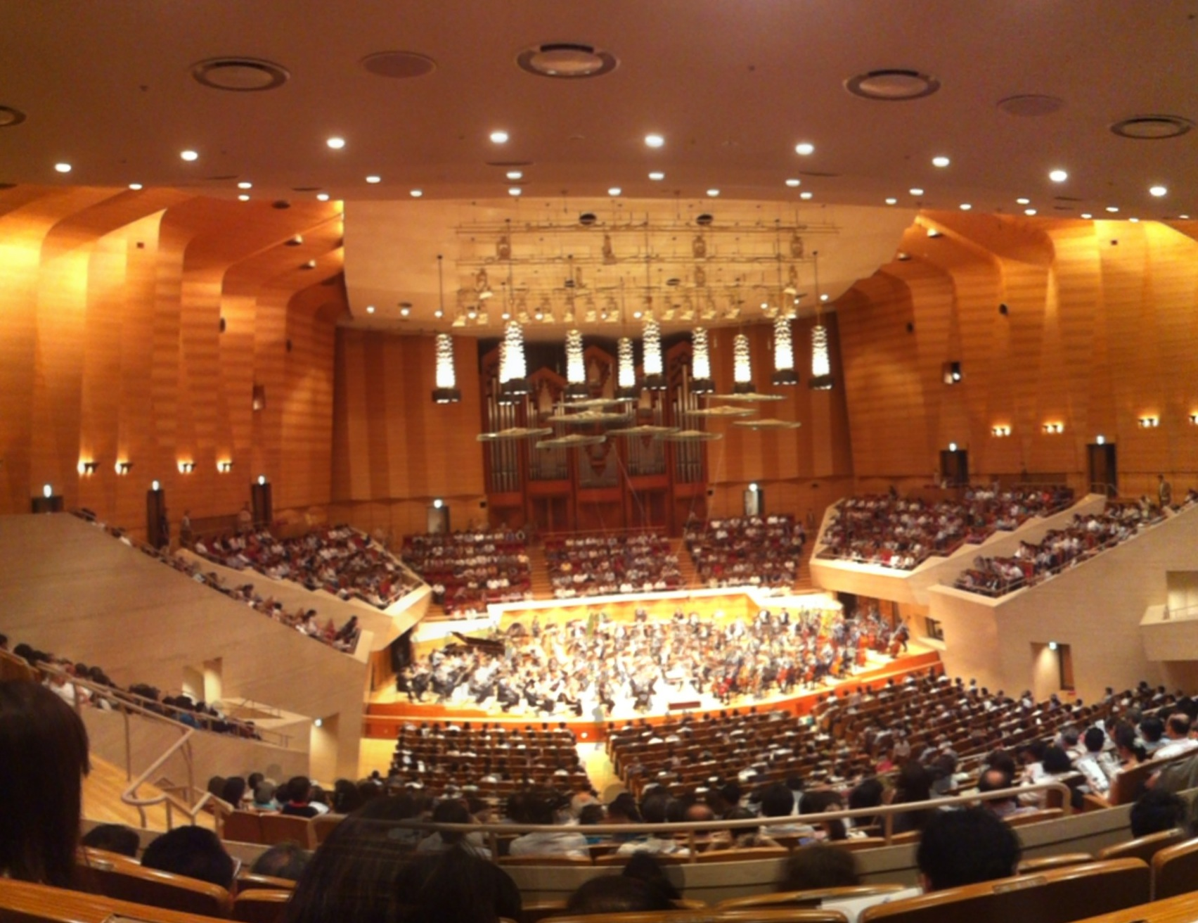 サントリーホールの中 Inside Suntory Hall